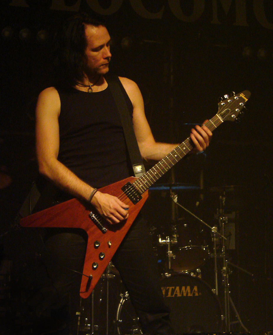 Dark Tranquillity, concert du 12/10/07 à la Locomotive à Paris. Niklas Sundin à la guitare.